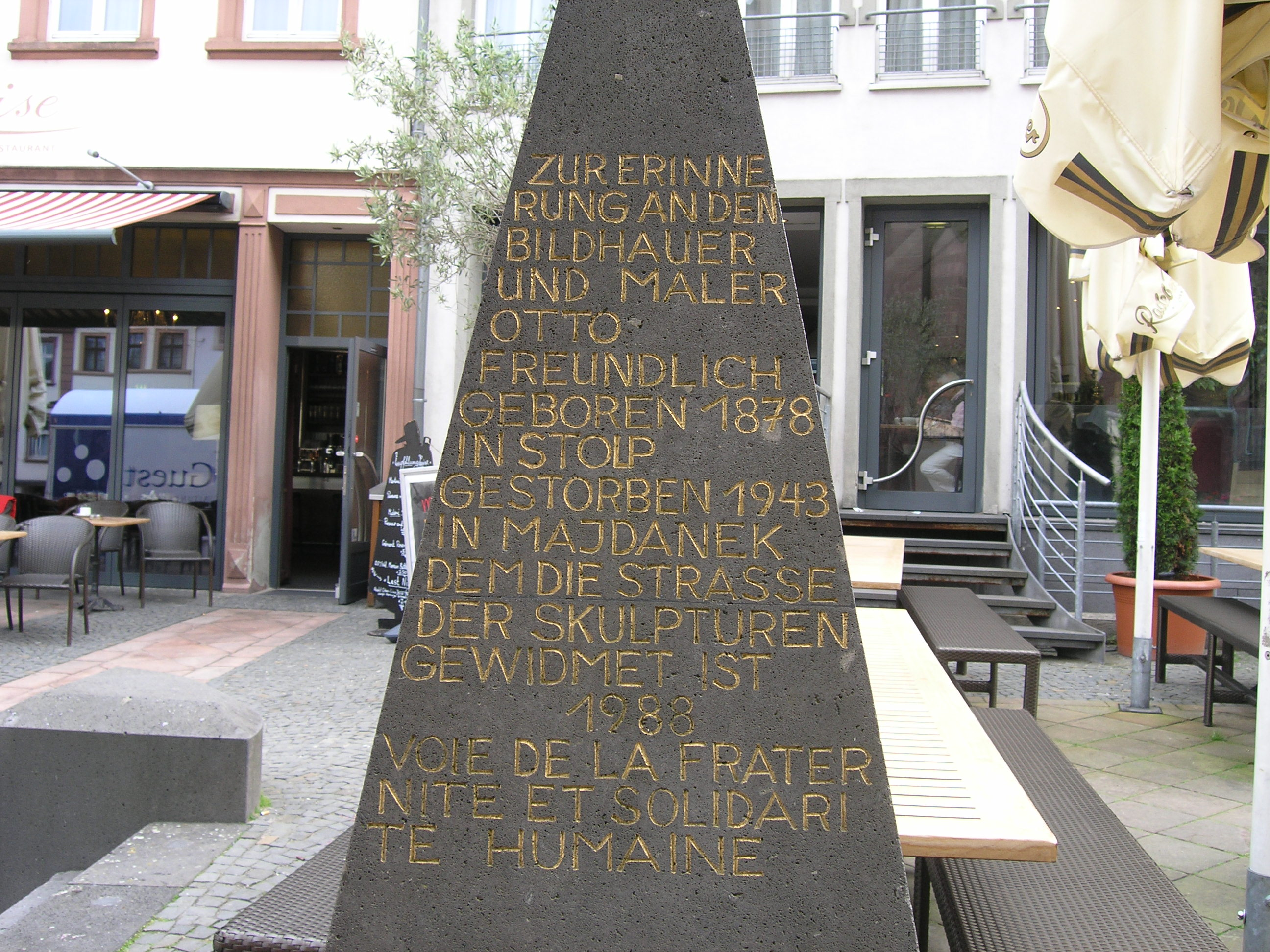 Denkmal für den Bildhauer Otto Freundlich am Fruchtmarkt in St. Wendel.